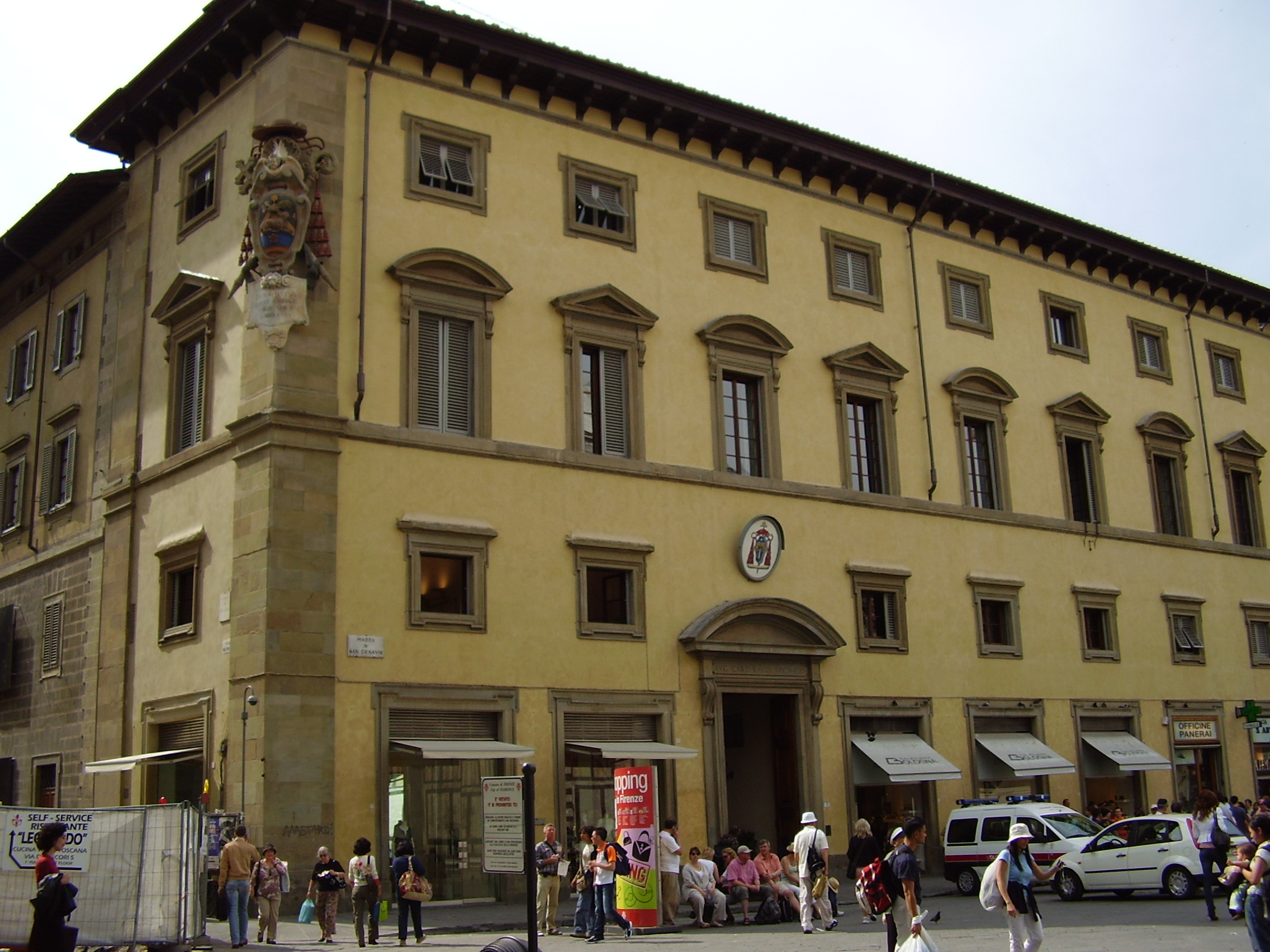 Palazzo arcivescovile, near the Duomo in Florence, Italy Firenze